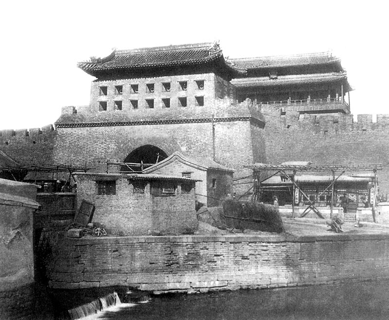 北京永定城楼及箭楼 1950年